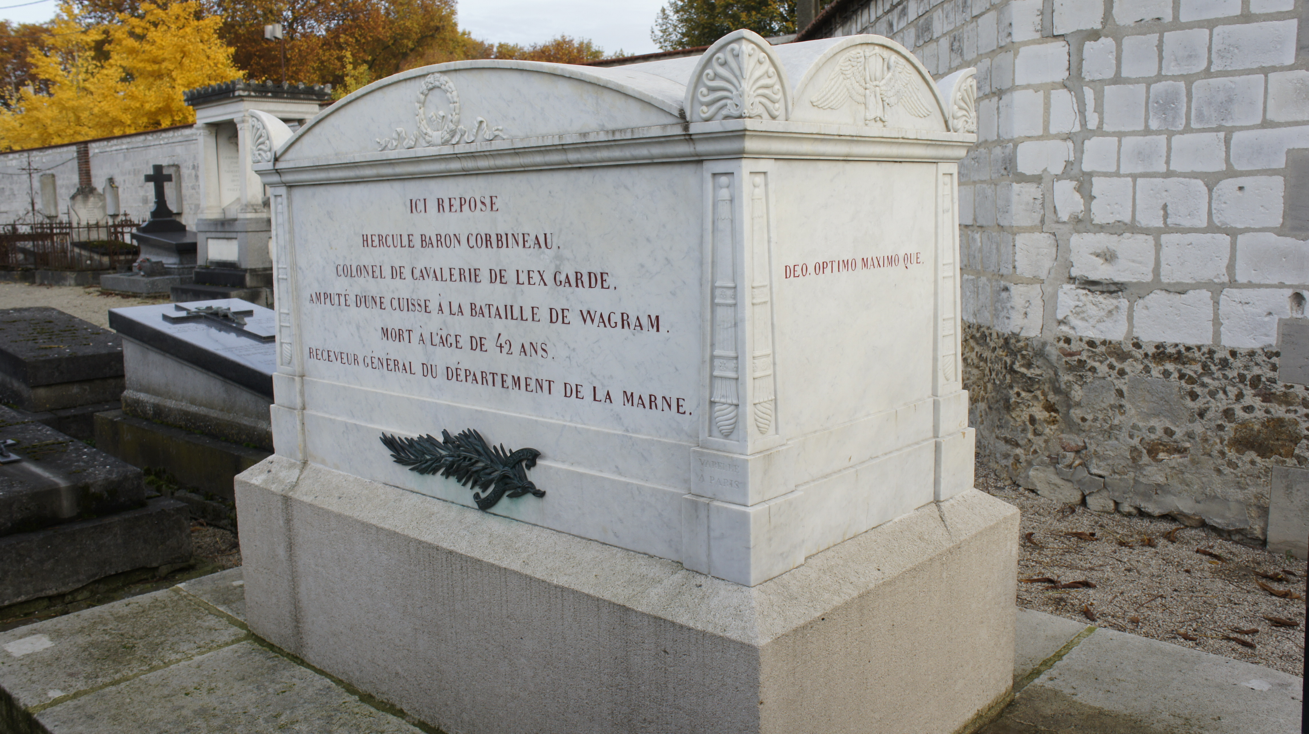 La tombe de Corbineau à Chalons, rénovée par le Souvenir français.